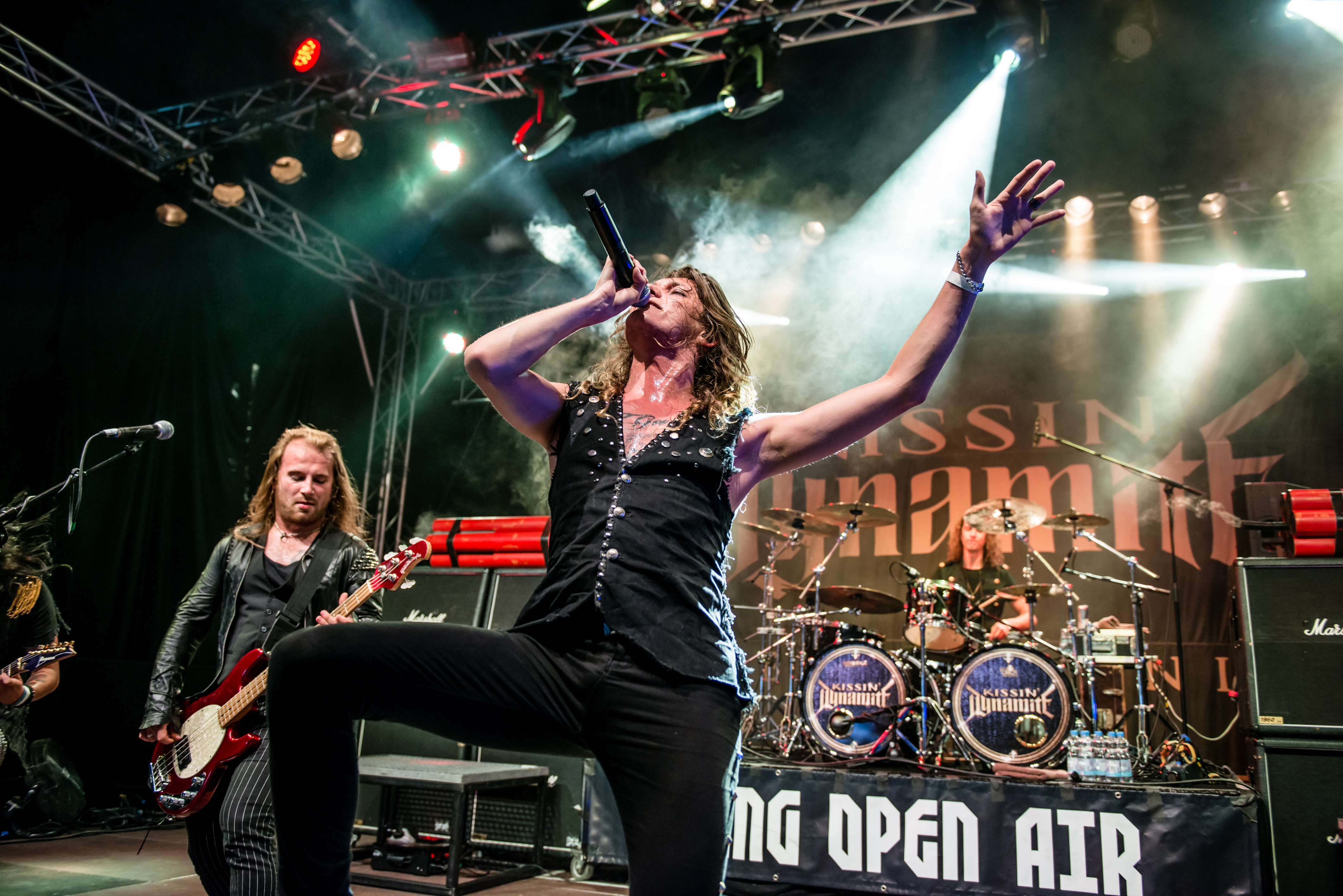 'Dong Open Air 2015; Neukirchen-Vluyn Halde Norddeutschland': 'Kissin' Dynamite'